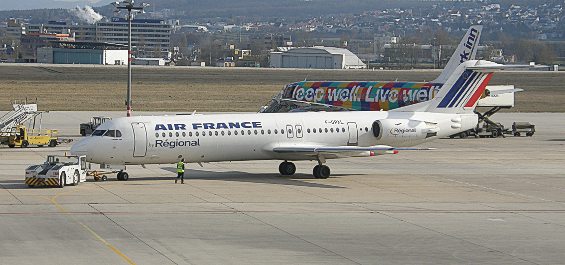 Fokker F 100 der Air France Regional (F-GPXL) in Stuttgart